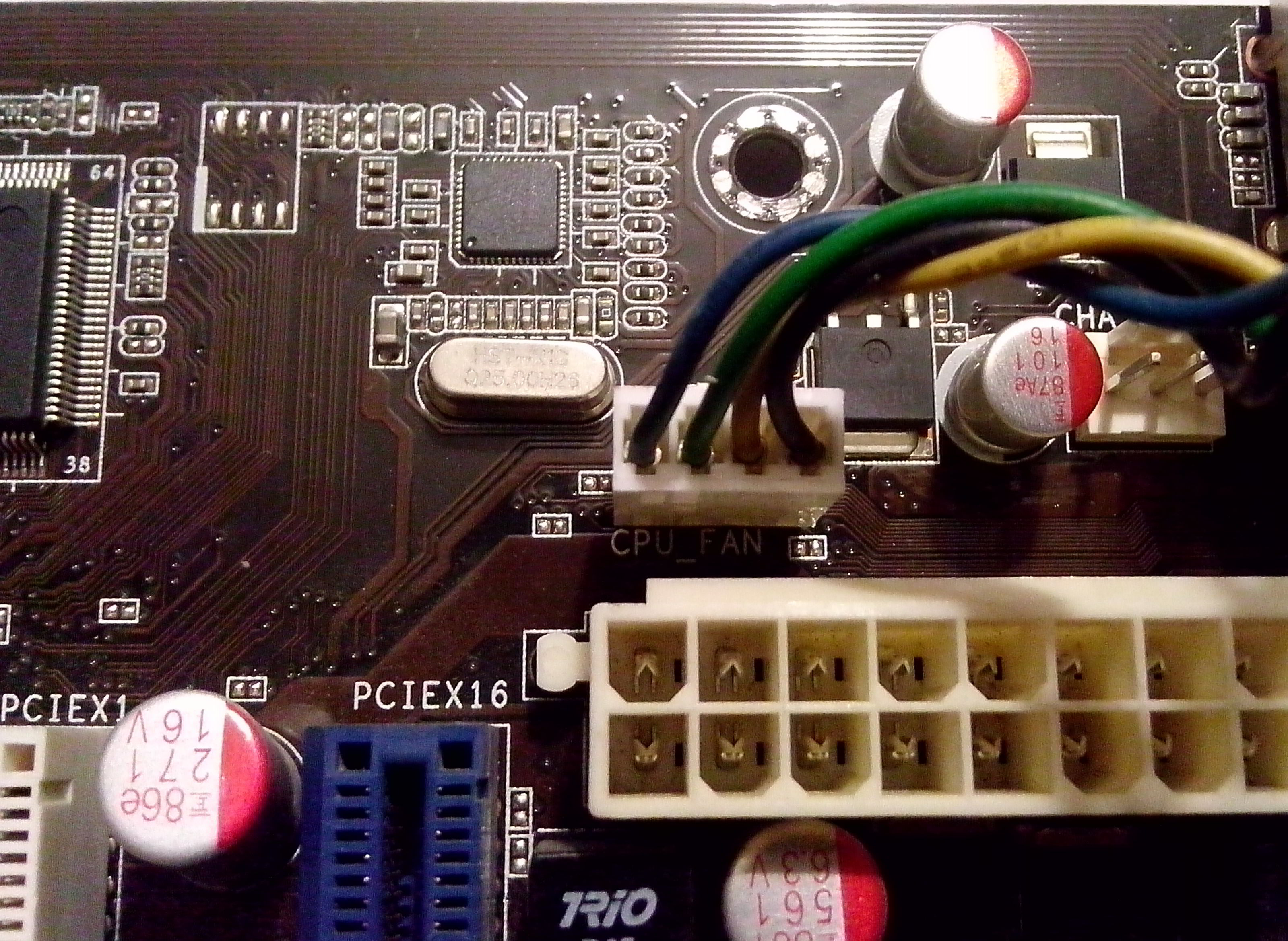 Материнская плата ASUS P5Q SE